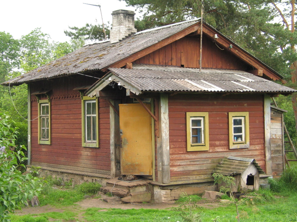 Ellamaa raudteejaama elamu